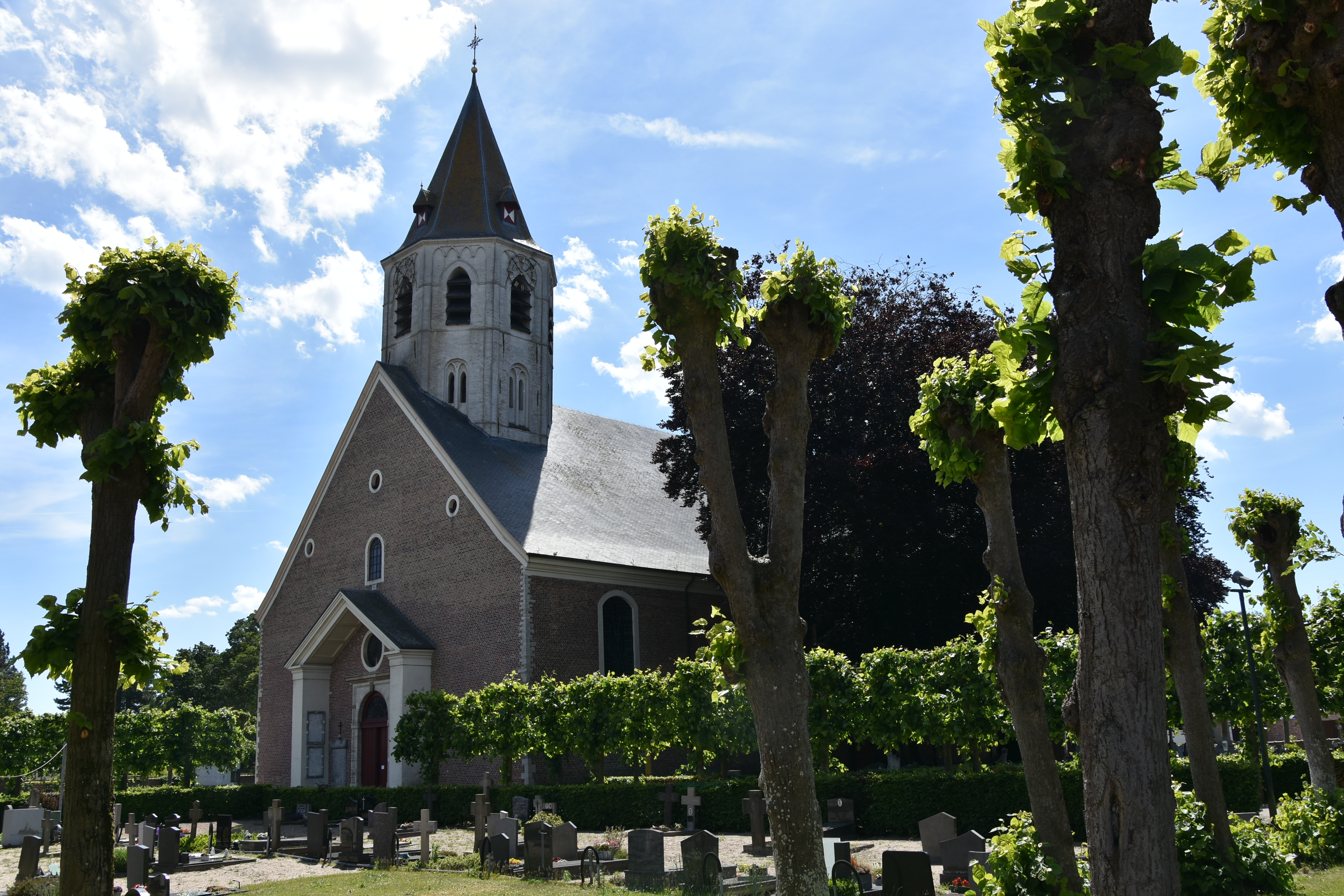 Onze-Lieve-Vrouw-Hemelvaartkerk (Kaprijke) (44747) 2-06-2019 15-12-24